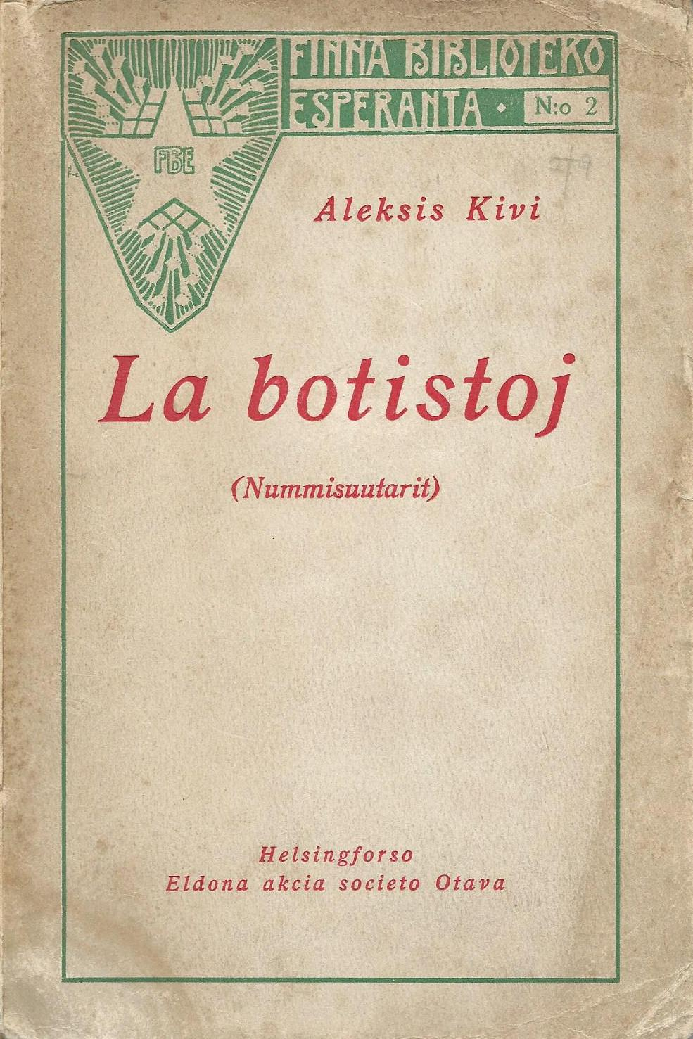 La Botistoj, 1919